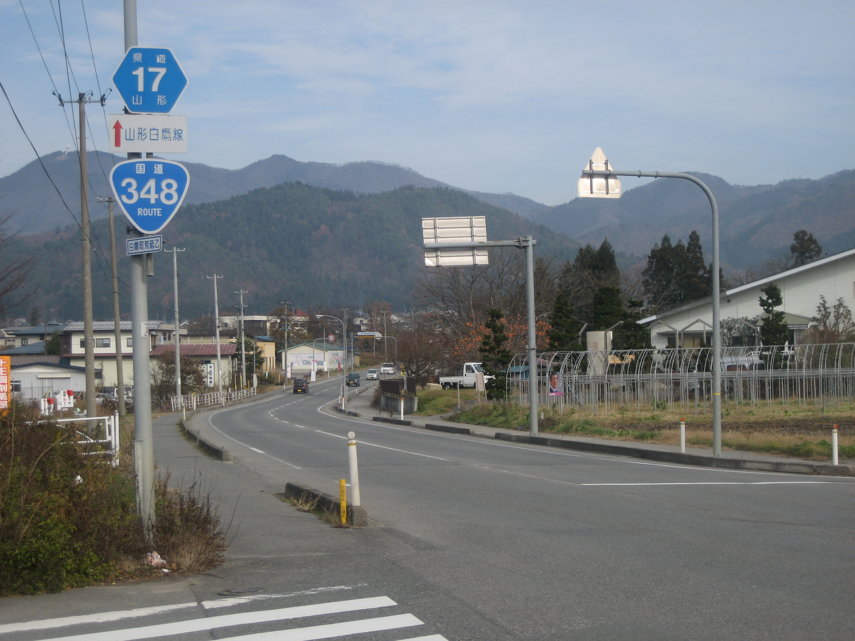 国道348号線山形県白鷹町荒砥乙付近（山形市方面を撮影）